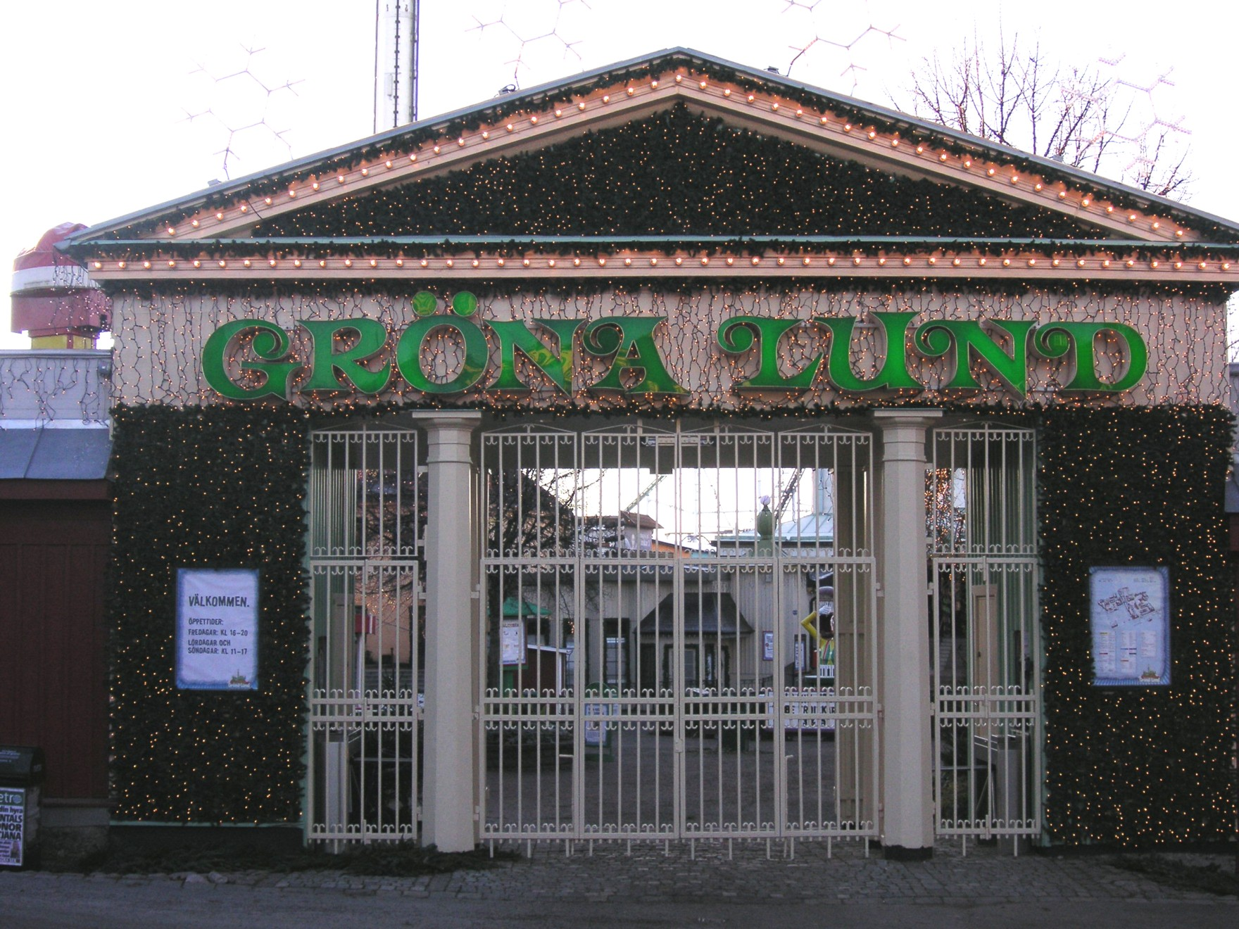 Djurgårdsstaden i Stockholm, gamla entrén till "Gröna Lund"